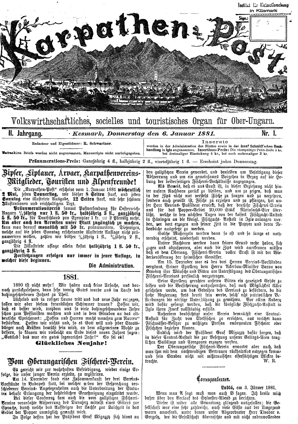 noviny Uhorského karpatského spolku